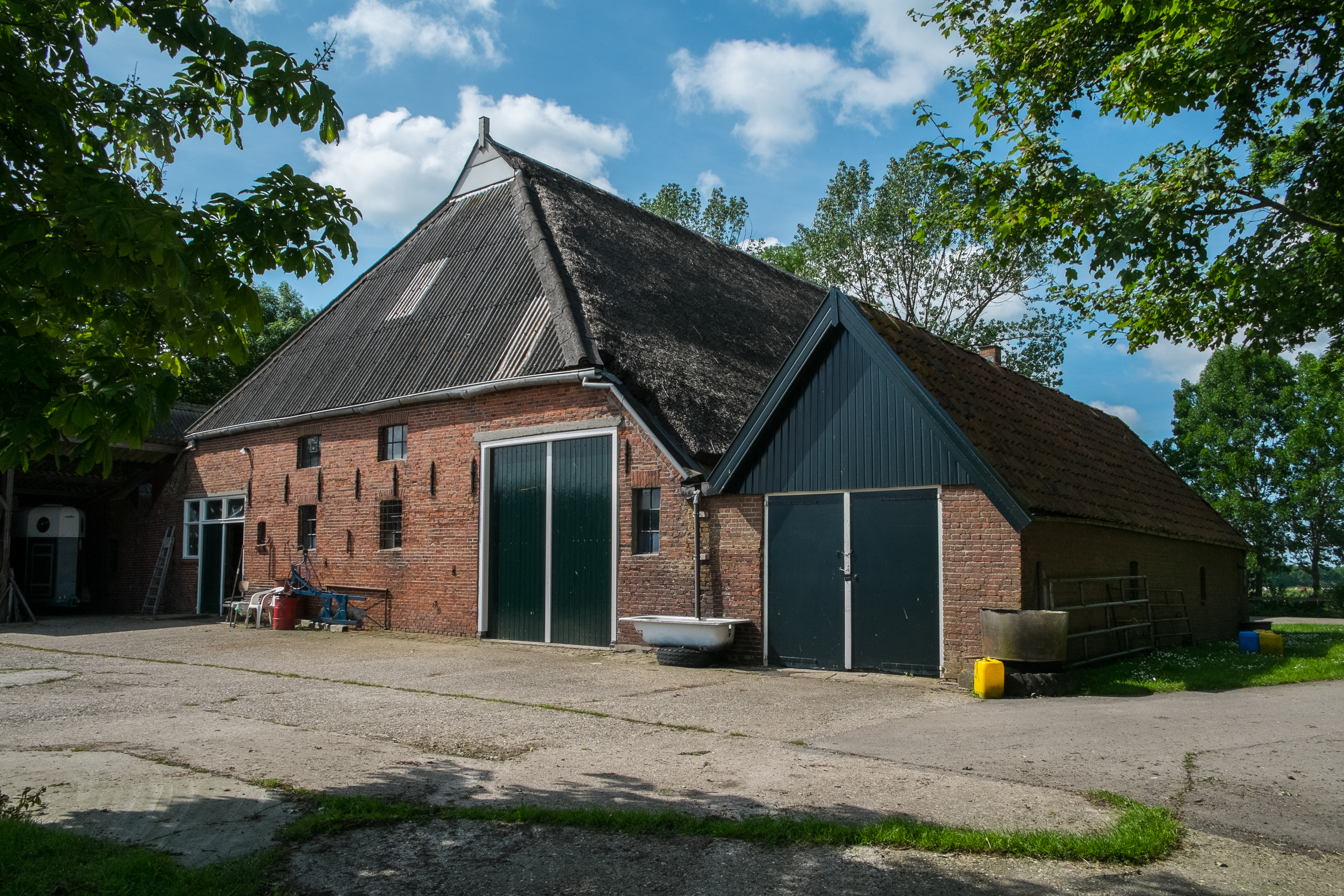 Boerderij Leegeweg 40